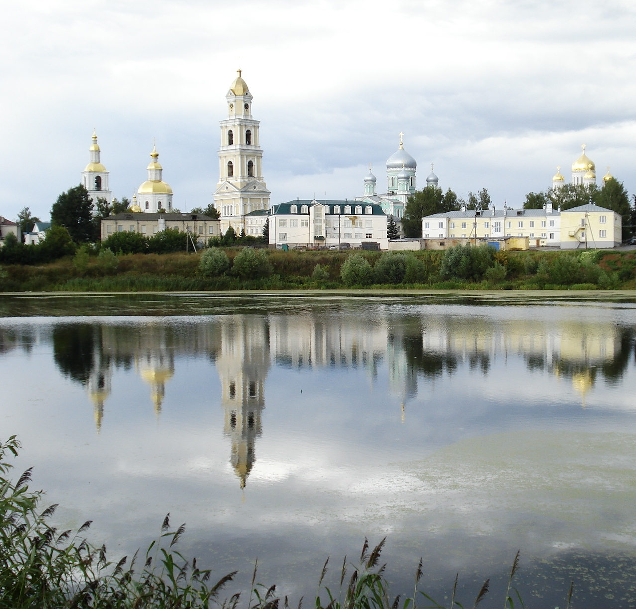 Серафимо-дивеевский монастырь (Нижегородская область, Саров, село дивеево)